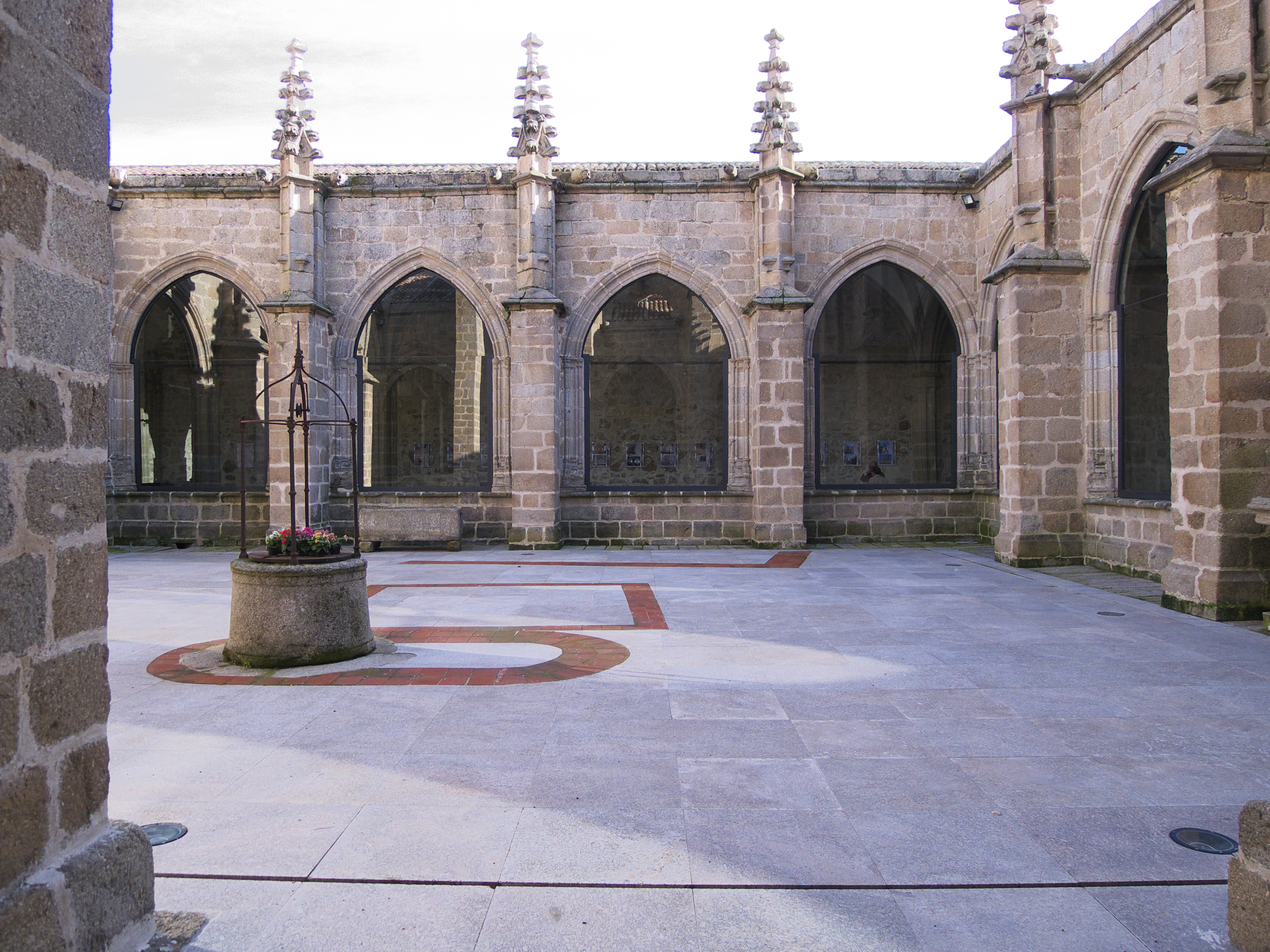 Talavera de la Reina. Claustro gótico del siglo XV